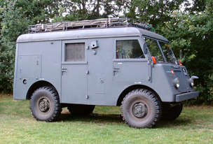 (Foto: G. van Keulen - Andijk (C) 2006) Afgebeeld een radiocommandowagen (funkommandowagen) uit het Zwitserse leger, bouwjaar 1957.